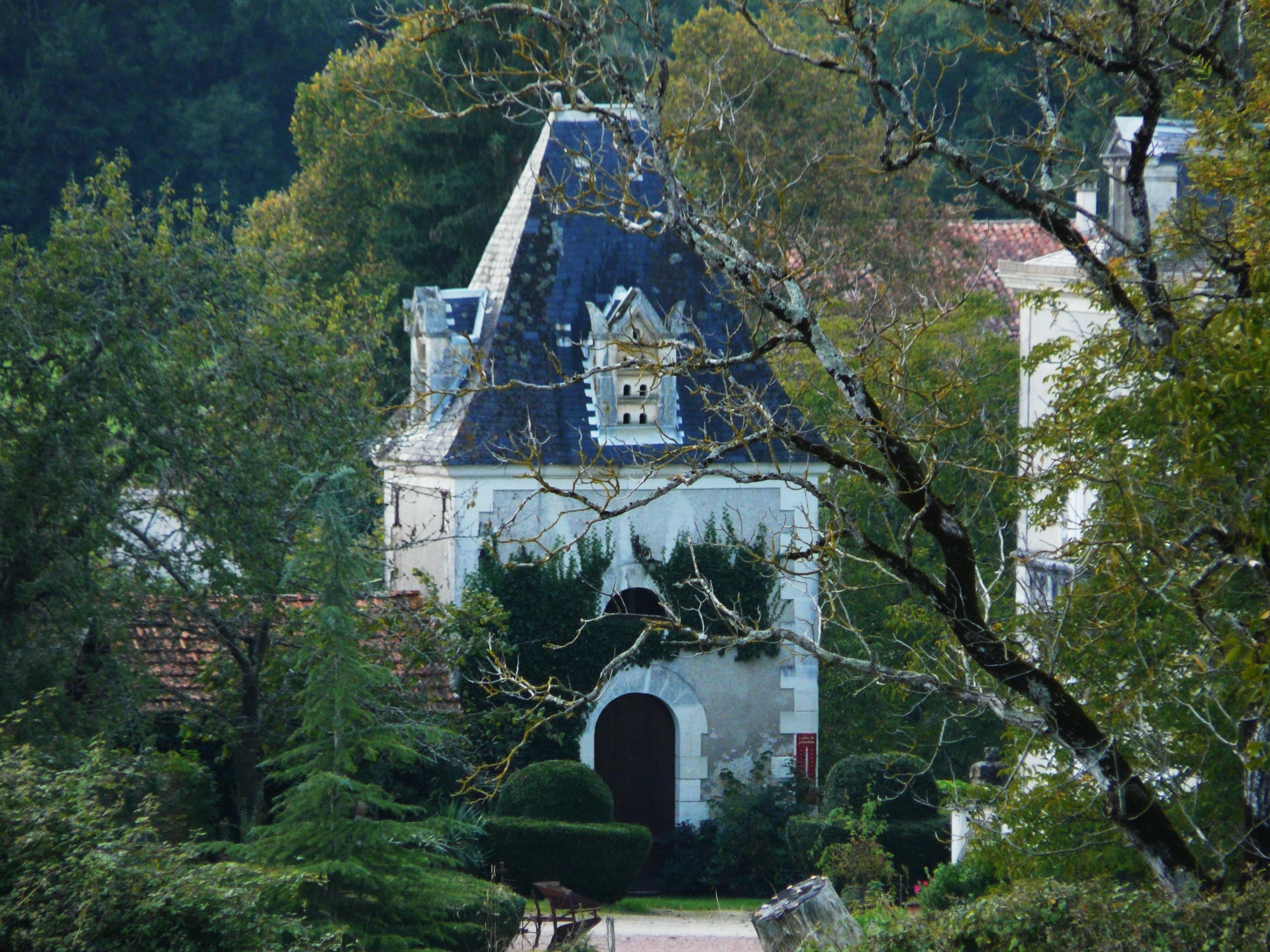 Le pigeonnier du Manoir de la Rigeardie, Bourdeilles, Dordogne, France .